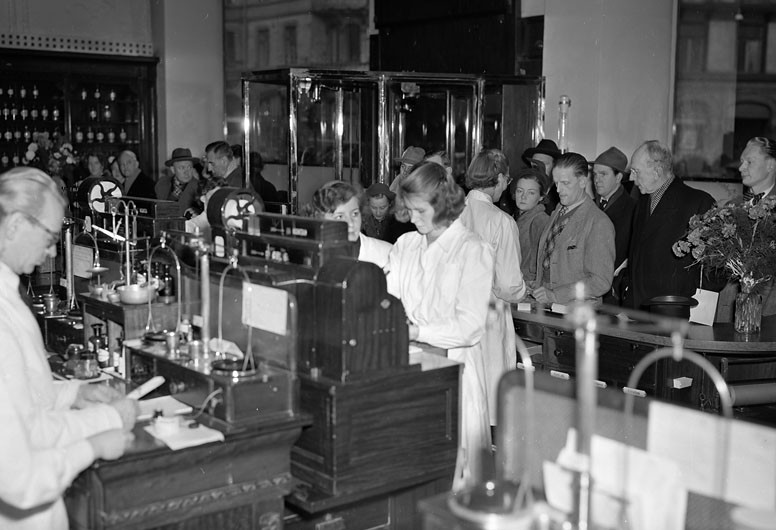 Stureplan 19. Apoteket Svanen firar 300-års jubileum. Anställda tar hand om kunder.